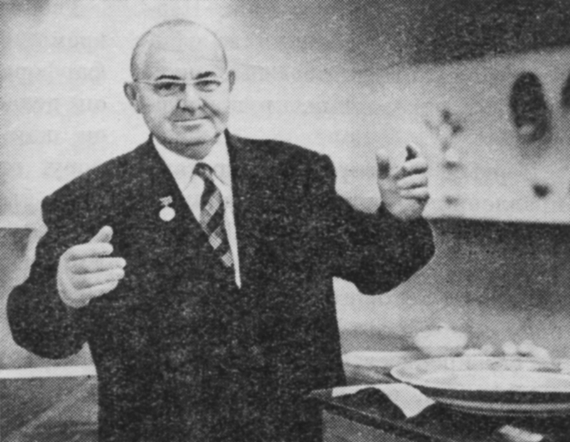 Глава художественной лаборатории Дулёвского фарфорового завода Леонов Петр Васильевич